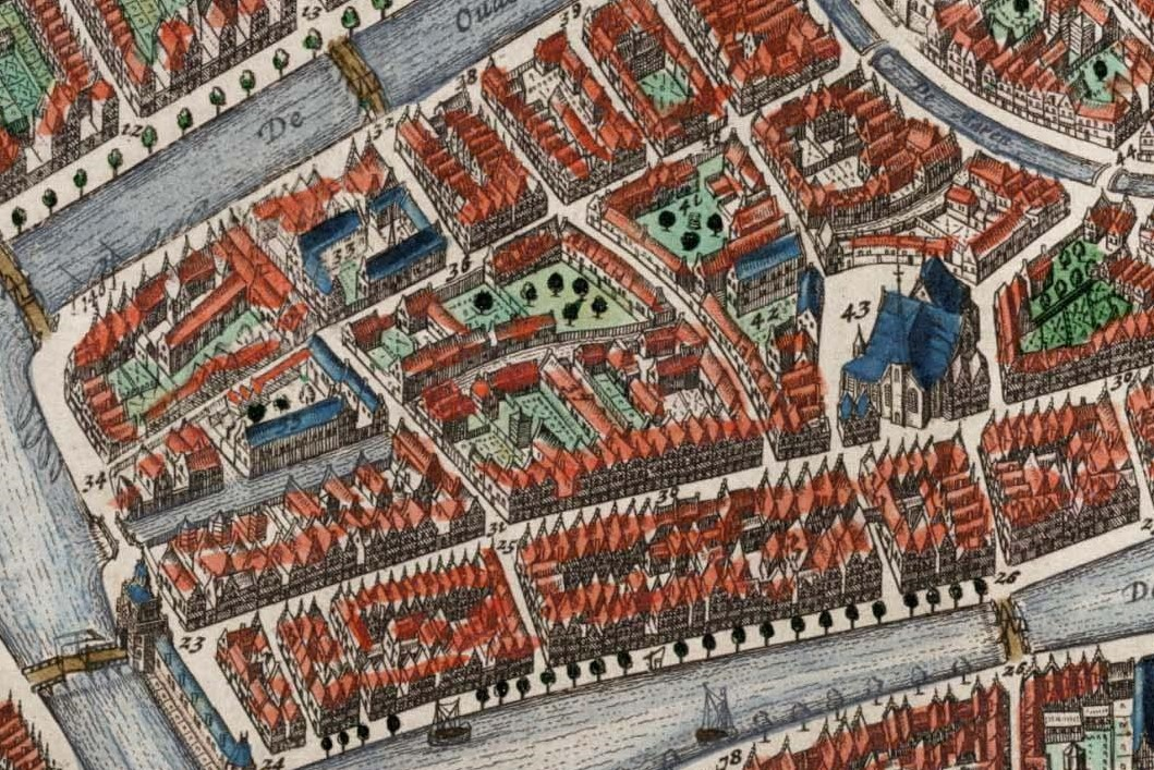 Detail van de kaart van Leiden van Blaeu uit 1649, met daarop o.a. Dolhuisgracht en Vrouwenkerk